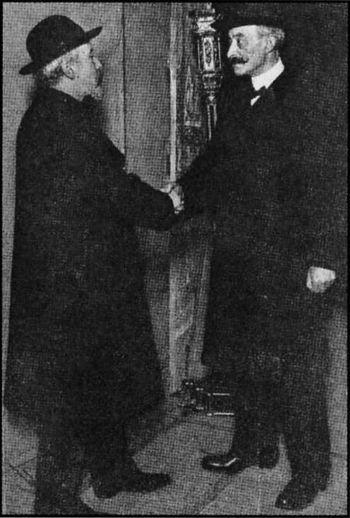 Gabriel Pierné félicitant Ernest Fanelli après la création des Tableaux symphoniques (Musical América, 6 avril 1912)